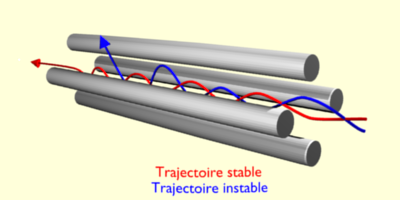 schéma analyseur quadripôlaire (quadripôle) en spectrométrie de masse et trajectoire des ions